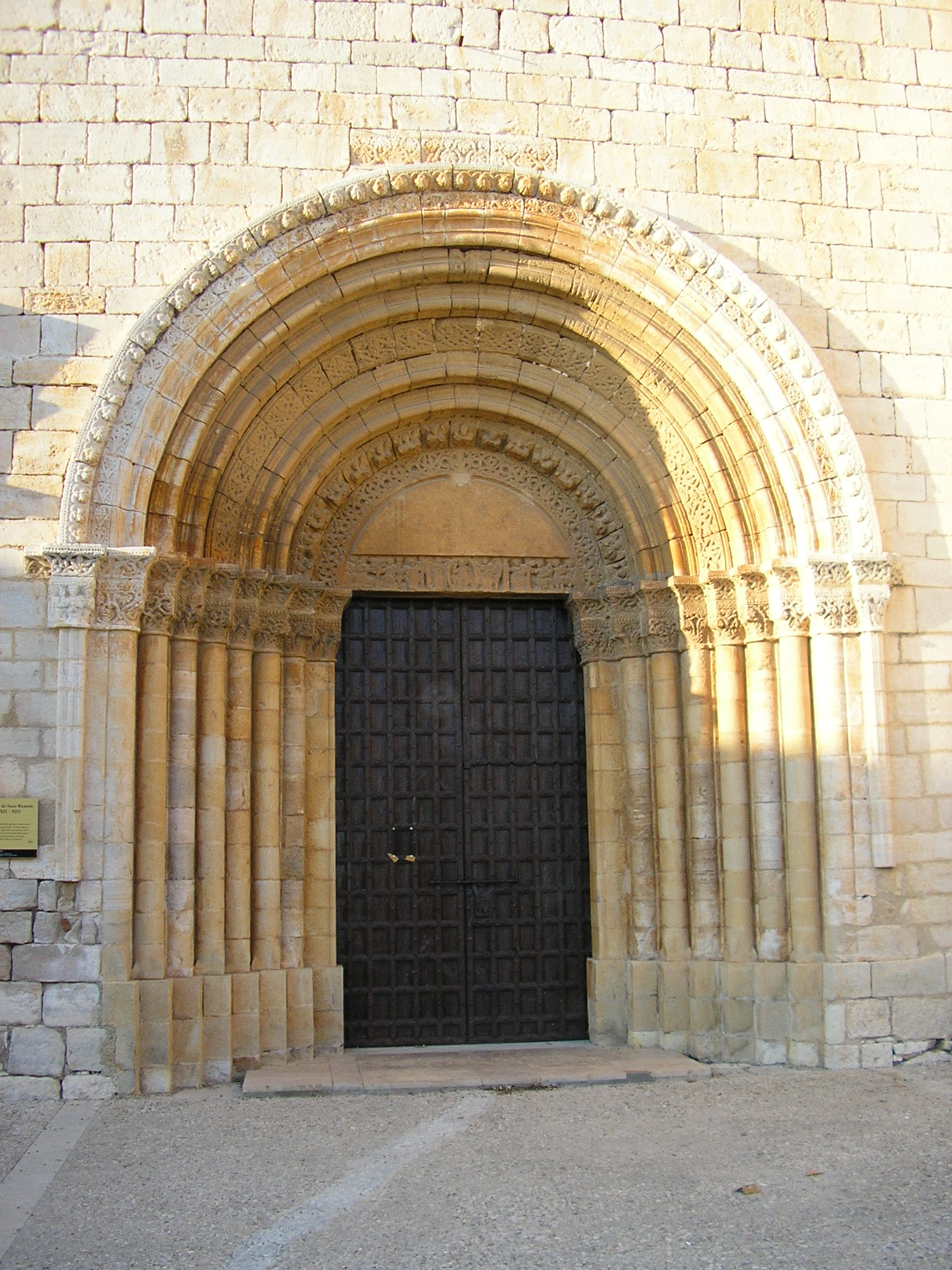 Pla de Santa Maria - Iglesia de Sant Ramon Penyafort (Portal